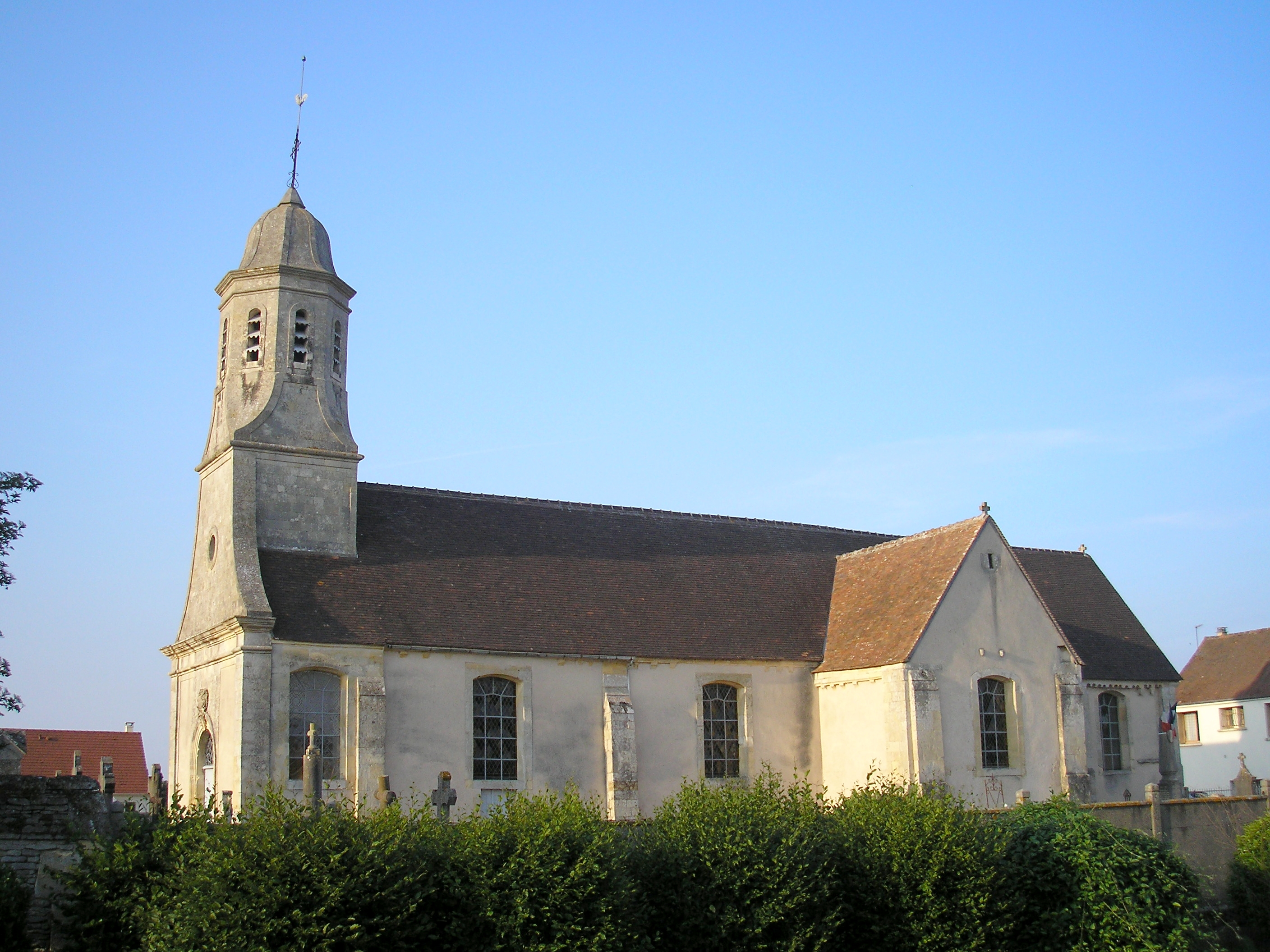 Vieux-Fumé (Normandie, France). L'église Saint-Germain.